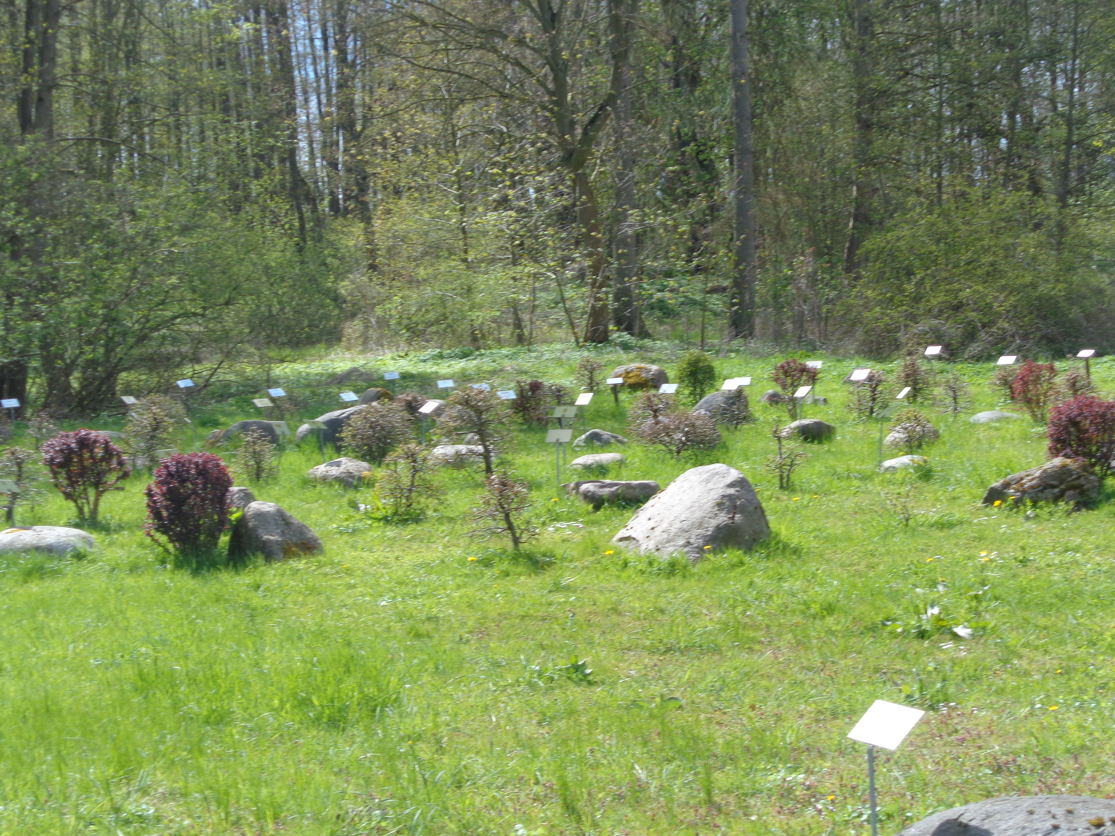 Erdgeschichtlicher Steingarten in Grubenhagen (Vollrathsruhe)